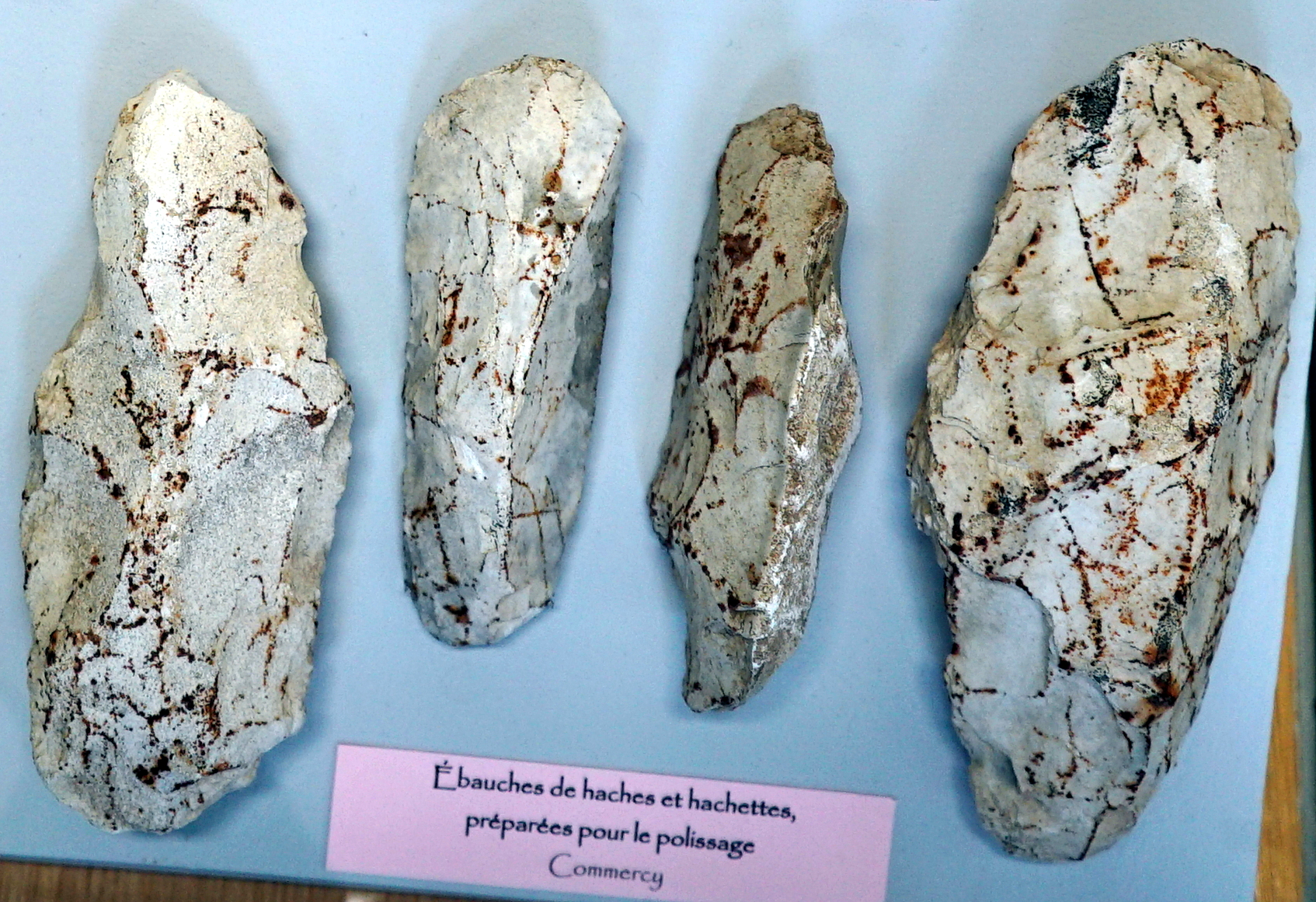 présenté au musée de Toul.